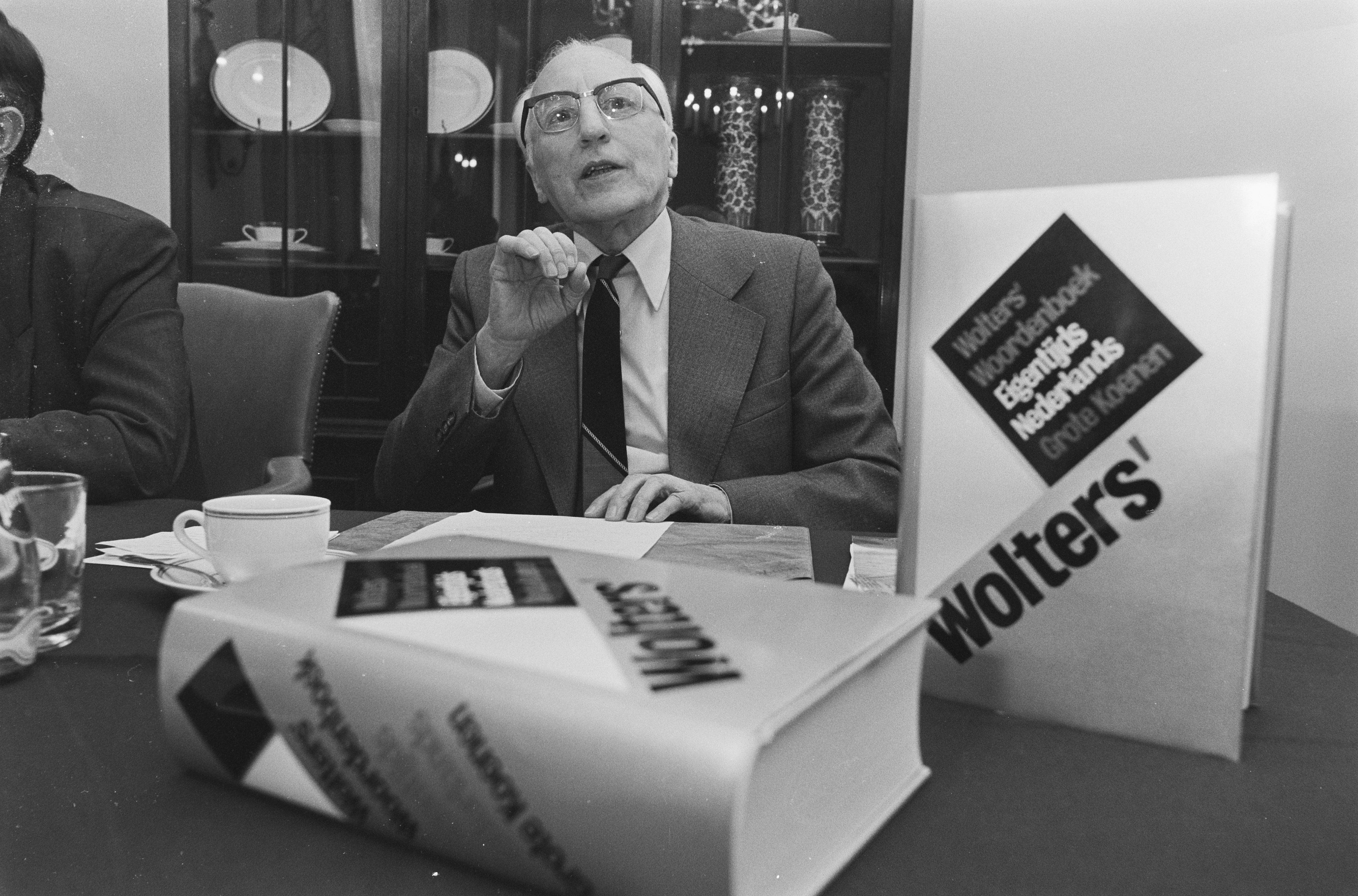 Collectie / Archief : Fotocollectie Anefo Reportage / Serie : [ onbekend ] Beschrijving : Presentatie Wolters' Grote Koenen in Amsterdam door samensteller dr. J.B. Drewes Datum : 21 oktober 1986 Locatie : Amsterdam, Noord-Holland Persoonsnaam : Drewes, J.B. Fotograaf : Croes, Rob C. / Anefo, [onbekend] Auteursrechthebbende : Nationaal Archief Materiaalsoort : Negatief (zwart/wit) Nummer archiefinventaris : bekijk toegang 2.24.01.05 Bestanddeelnummer : 933-7931